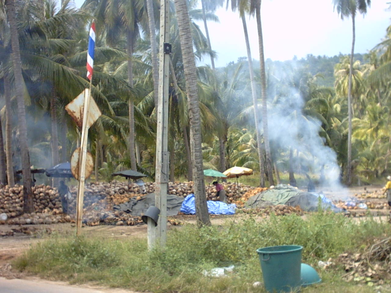 Kokosnussernte auf süd-östlicher Insel in Thailand.